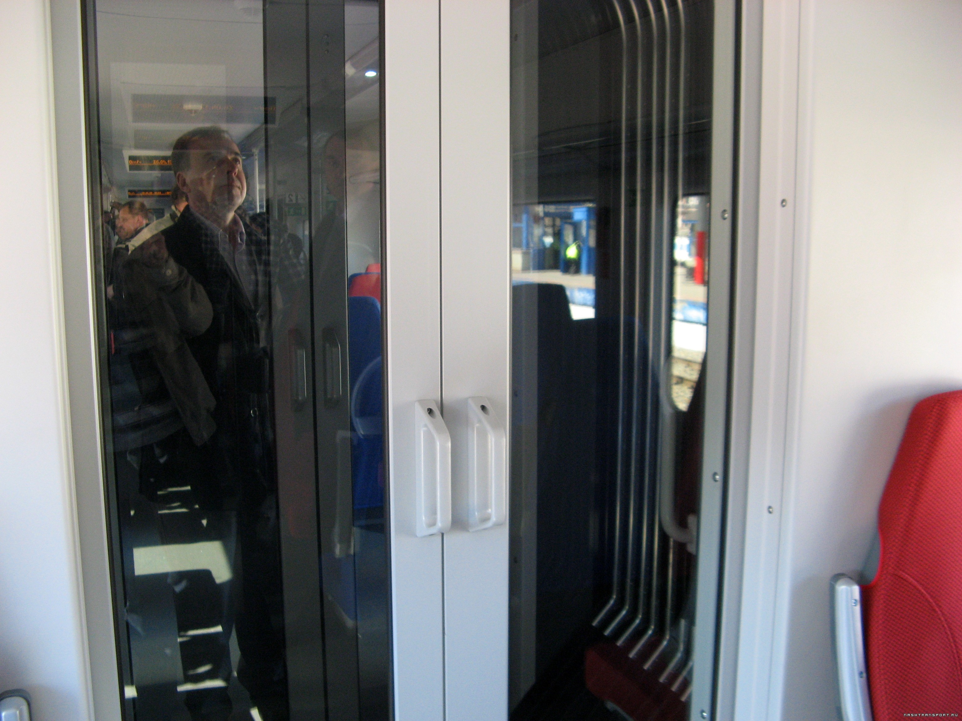 Салон электропоезда ЭС1. Дверь межвагонного перехода